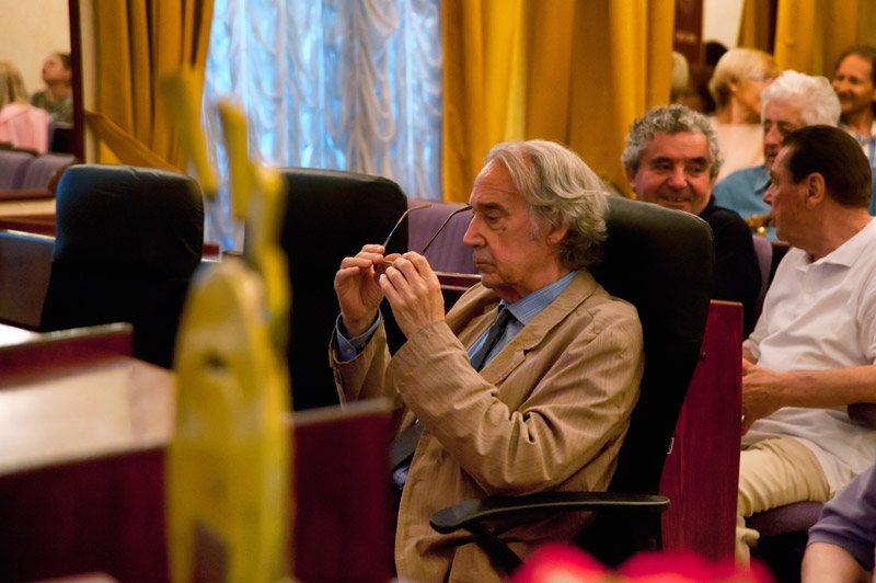 XII. jadranski književni susreti, Crikvenica. Sudionici: Ljerka Car Matutinović, Mirko Ćurić, Darko Pero Pernjak, Giacomo Scotti, Daria Žilić. Gost večeri: klapa Kala. Književnu nagradu "Crikveničko sunce" primio je akademik Nedjeljko Fabrio.